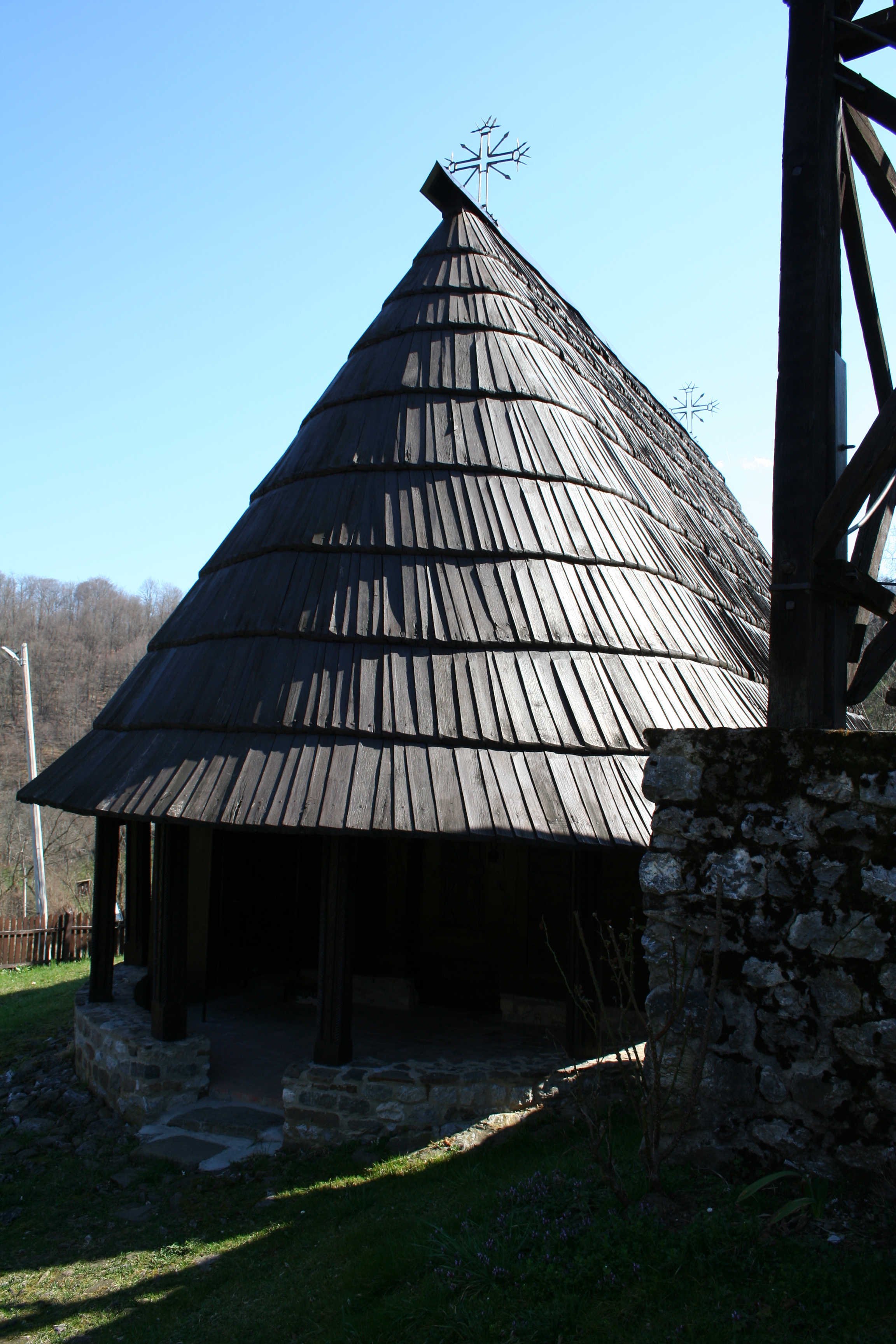 Crkva brvnara u Skadru